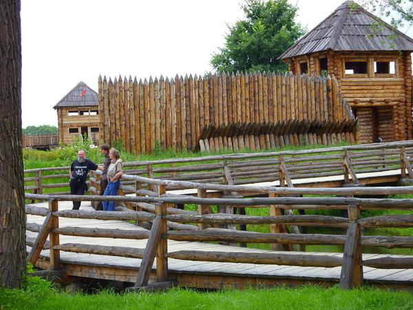 Rezerwat Archeologiczny w Kaliszu-Zawodziu